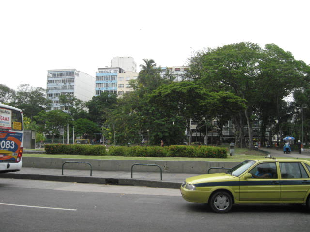 Praça Afonso Pena, Tijuca